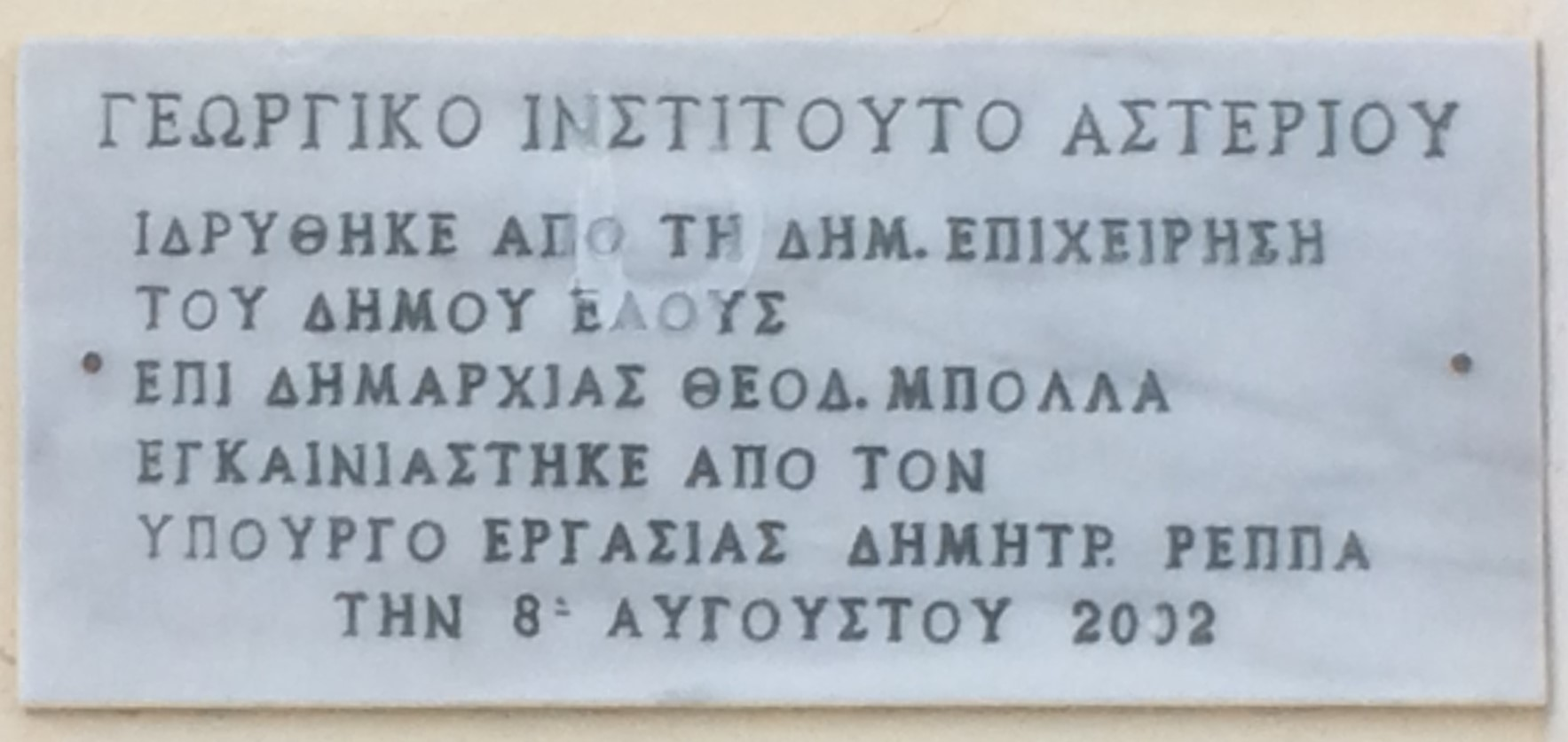 Πινακίδα Εγκαινίων Γεωργικού Ινστιτούτου (Αστέρι, Λακωνίας)